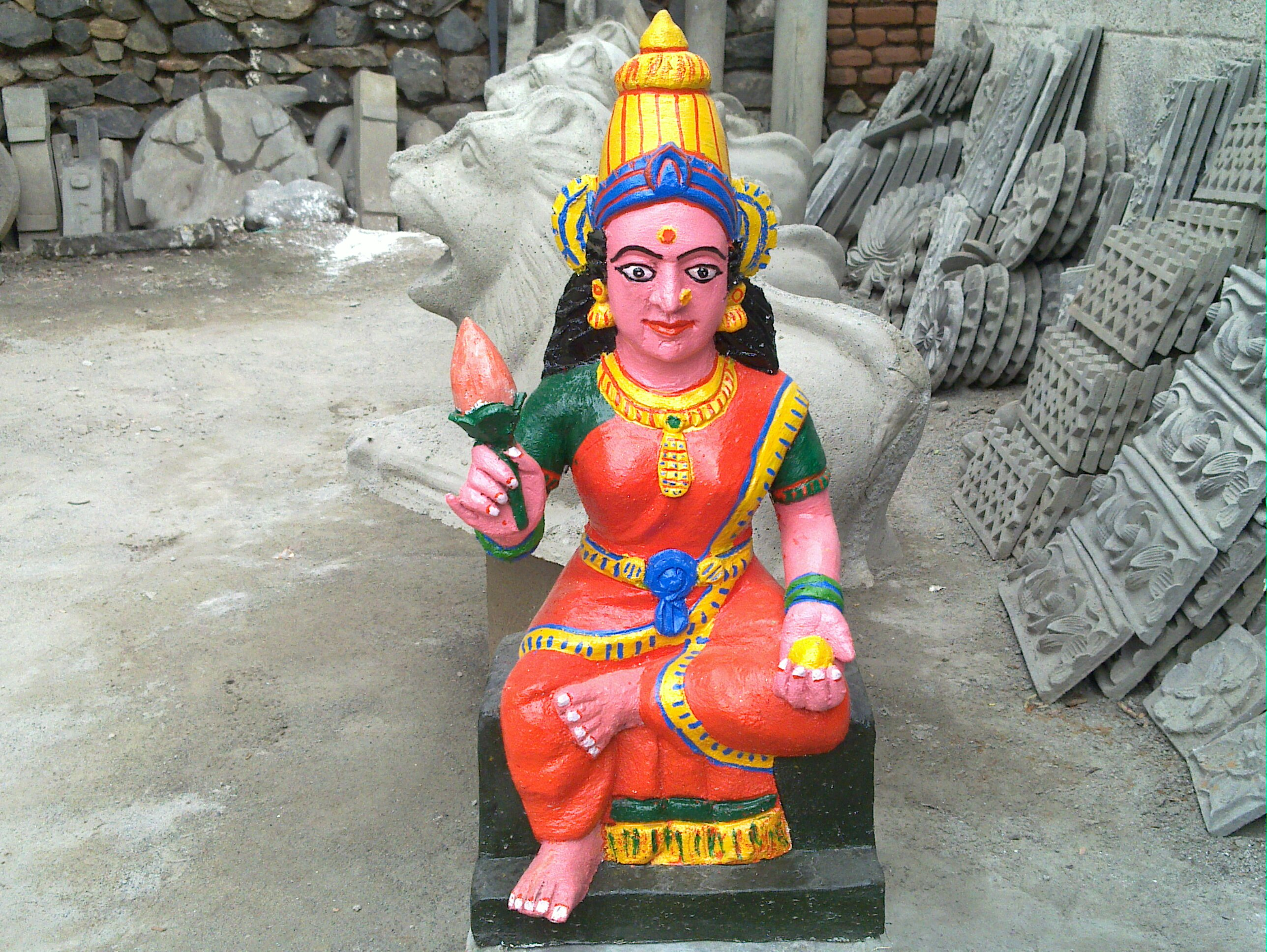 மண்ணால் செய்யப்பட்ட ஊர்க்காவல் பெண் தெய்வம்